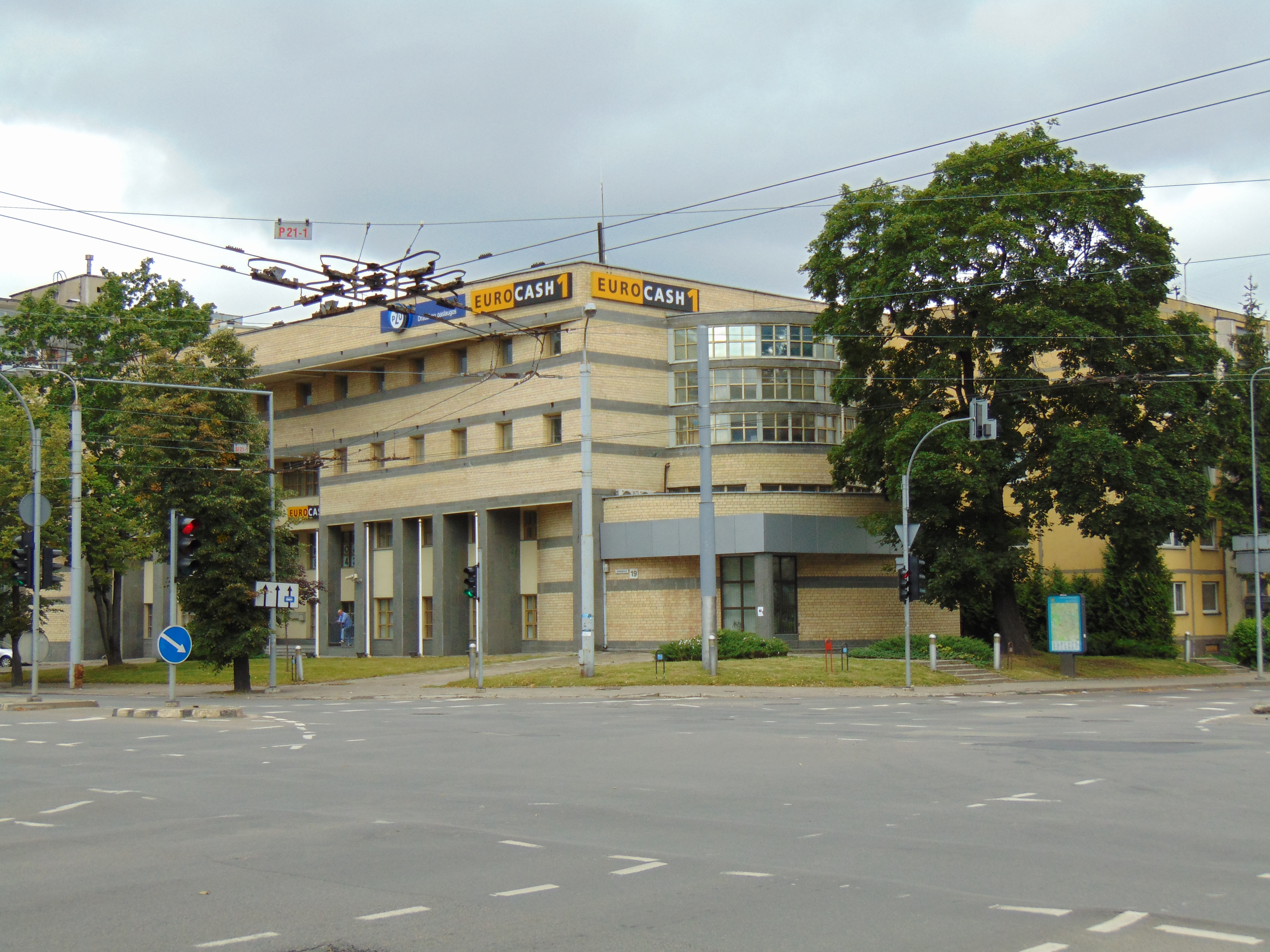 Hansabankas